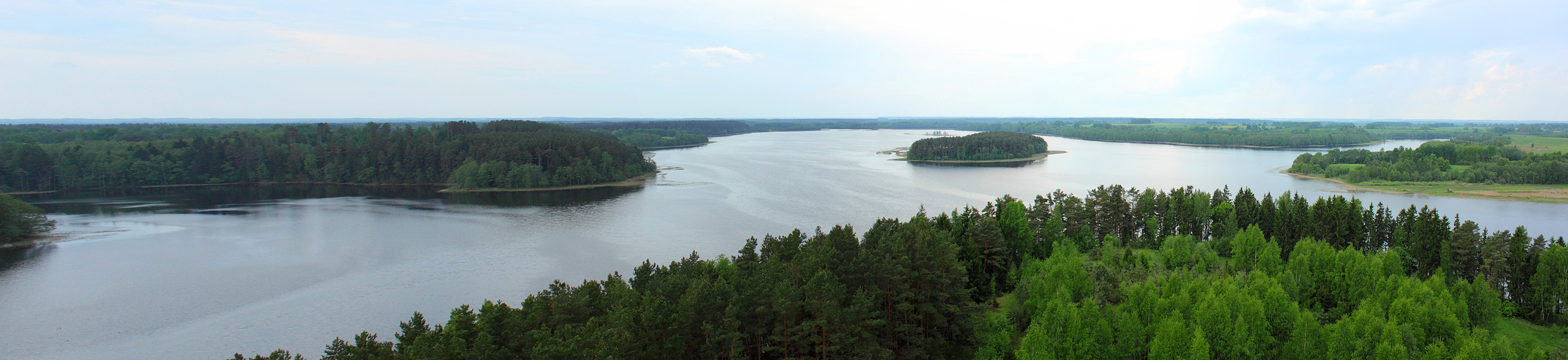 Sartų ežeras